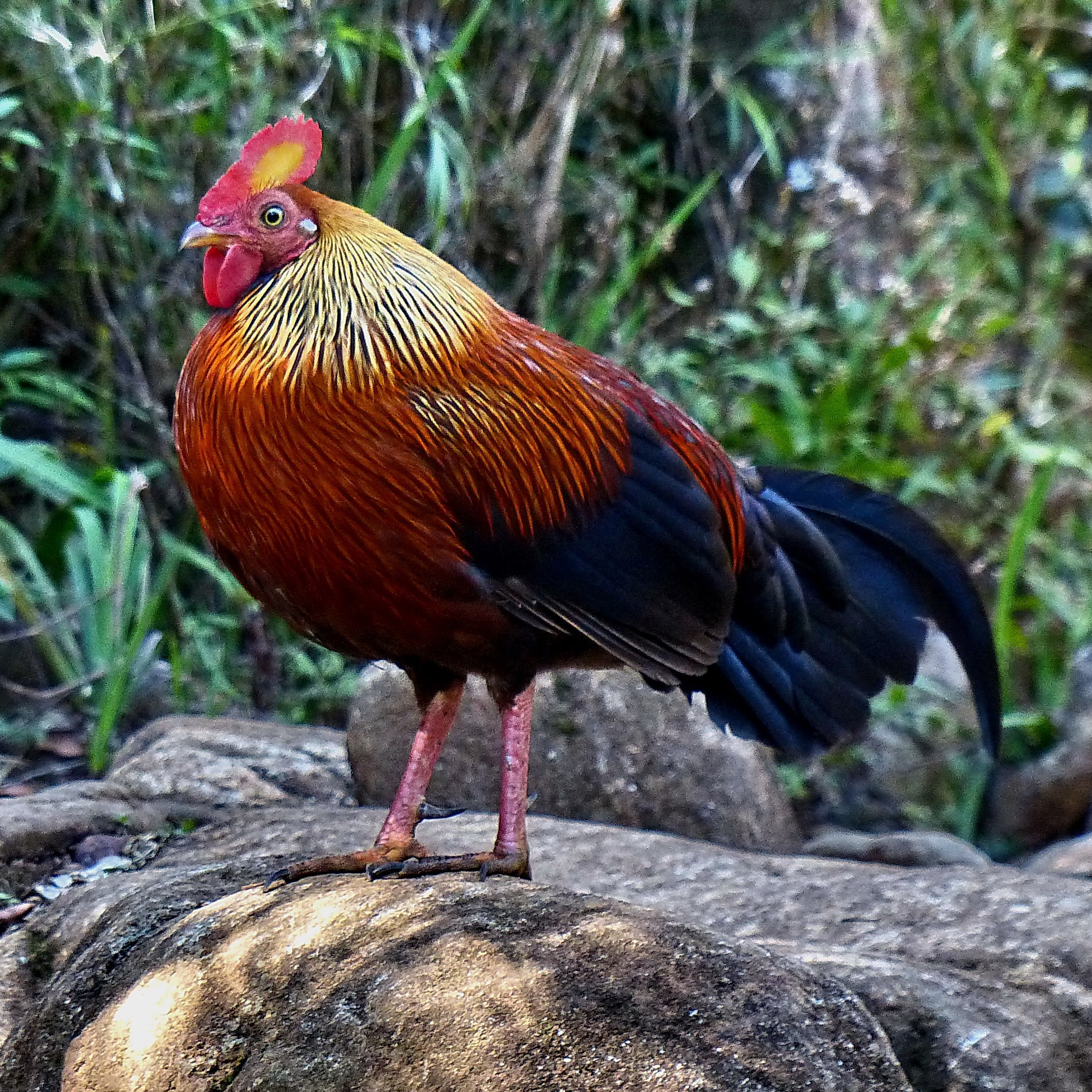 Ceylonhuhn (Gallus lafayettii) im Horton Plains Nationalpark